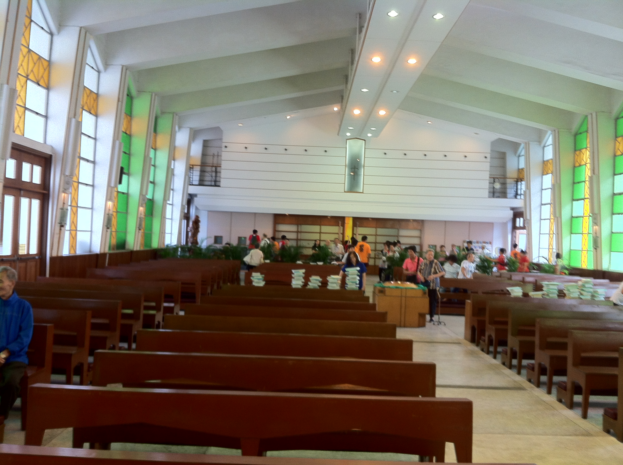 中文（香港）: 善導之母堂, 香港, 中國